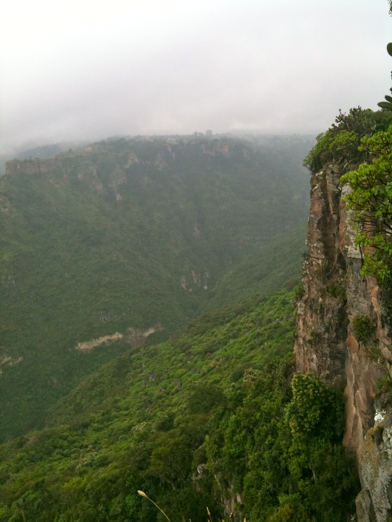 Cañon entre Veracruz e Hidalgo.